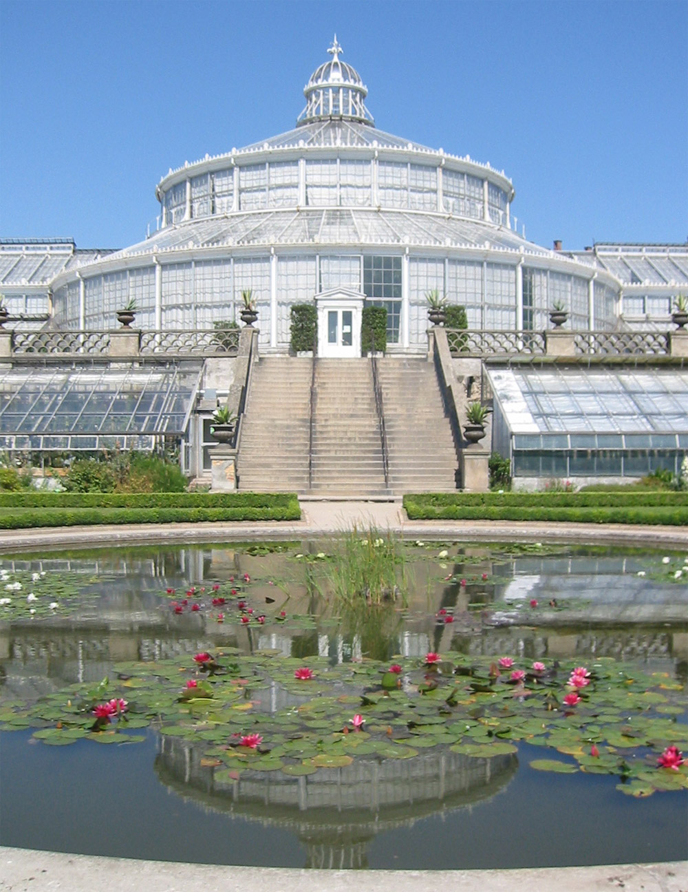 GNU-FDL; Botanischer Garten, Kopenhagen; August 2004; Selbstfotografiert